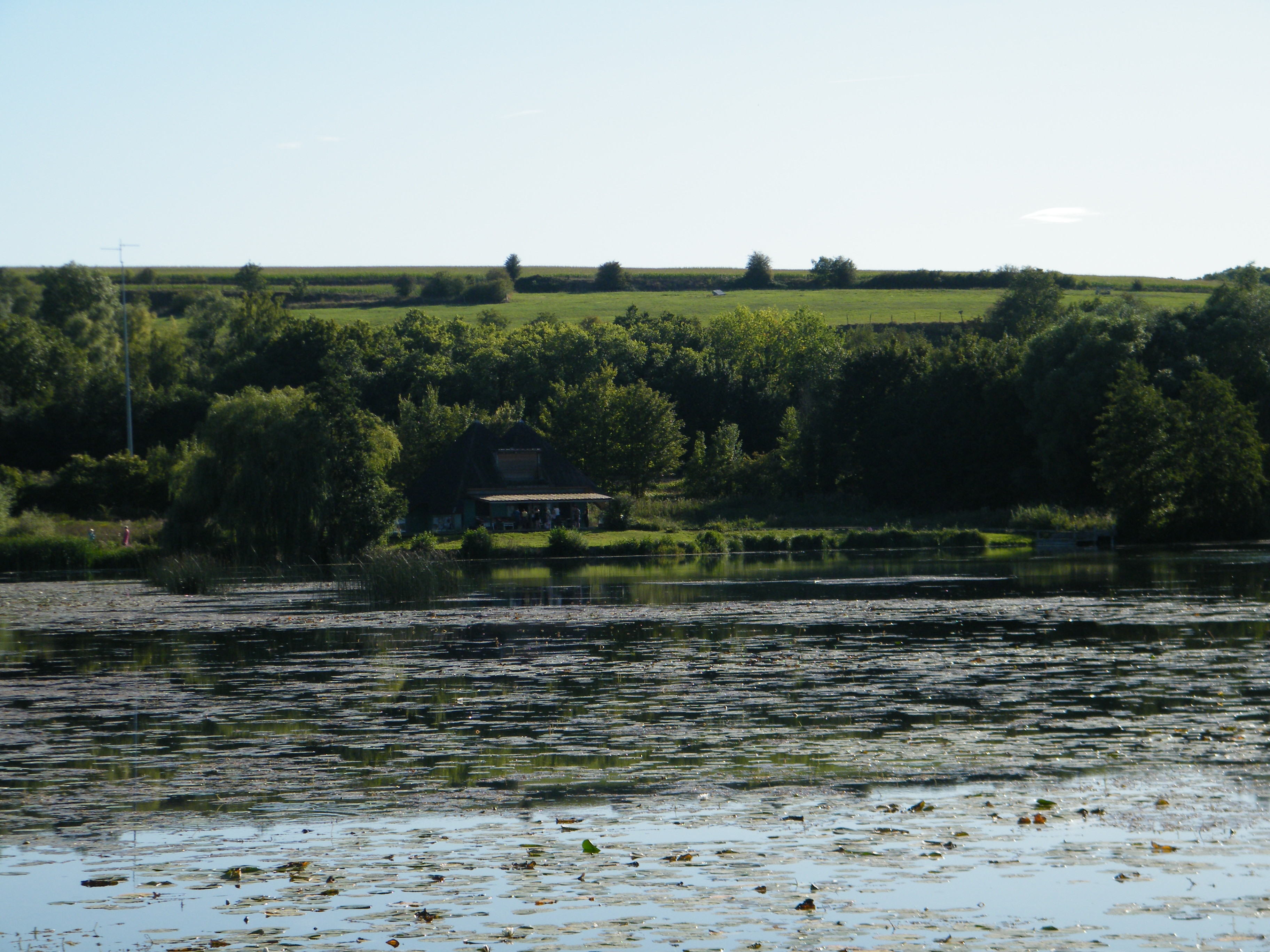 Longpré-les-Corps-Saints, Somme, France, la maison des marais dans son environnement.